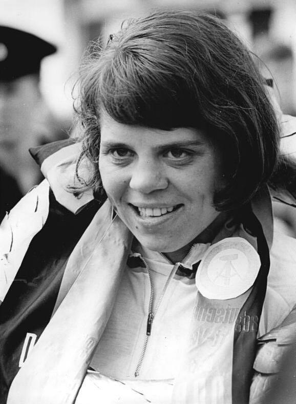 Hannelore Mattig Zentralbild Gahlbeck wen 25.7.1966 Hohenstein-Ernstthal: Deutsche Meisterschaften im Strassenfahren der Frauen am 24.7.1966 auf dem Sachsenring. Die glückstrahlende neue deutsche Meisterin im Strassenfahren, Hannelore Mattig (TSC Berlin) nach der Siegerehrung, Hannelore Mattig schaffte die 52 km in 1: 40:02 st. und erkämpfte sich damit ihren dritten Meistertitel in diesem Jahr, nachdem sie bereits auf der Bahn im Zeifahren über 500 m und 3000 m erfolgreich war.